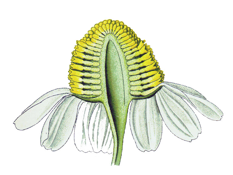 Matricaria recutita - Dieselbe im Längsschnitt